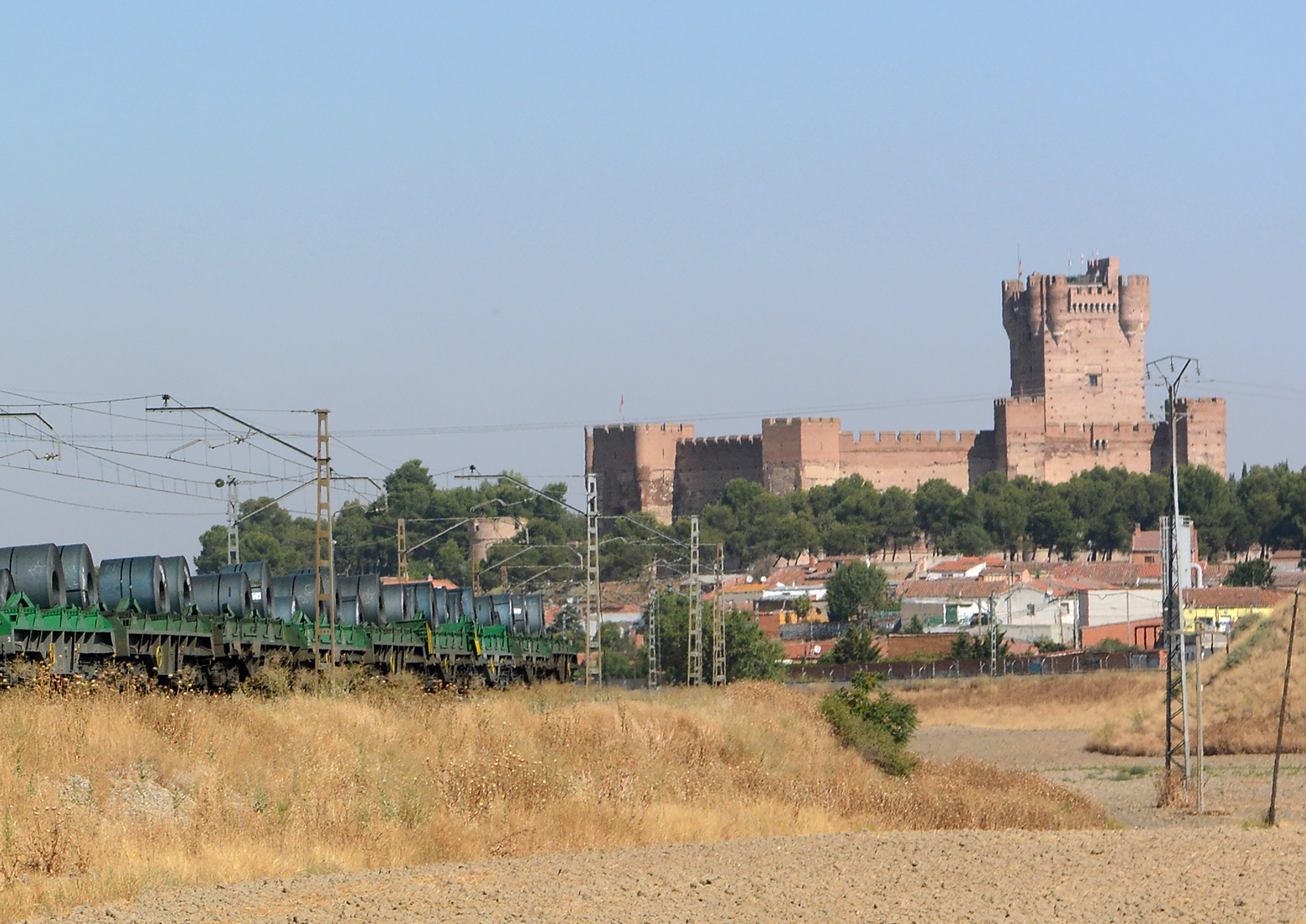 Comboio Siderúrgico saindo de Medina